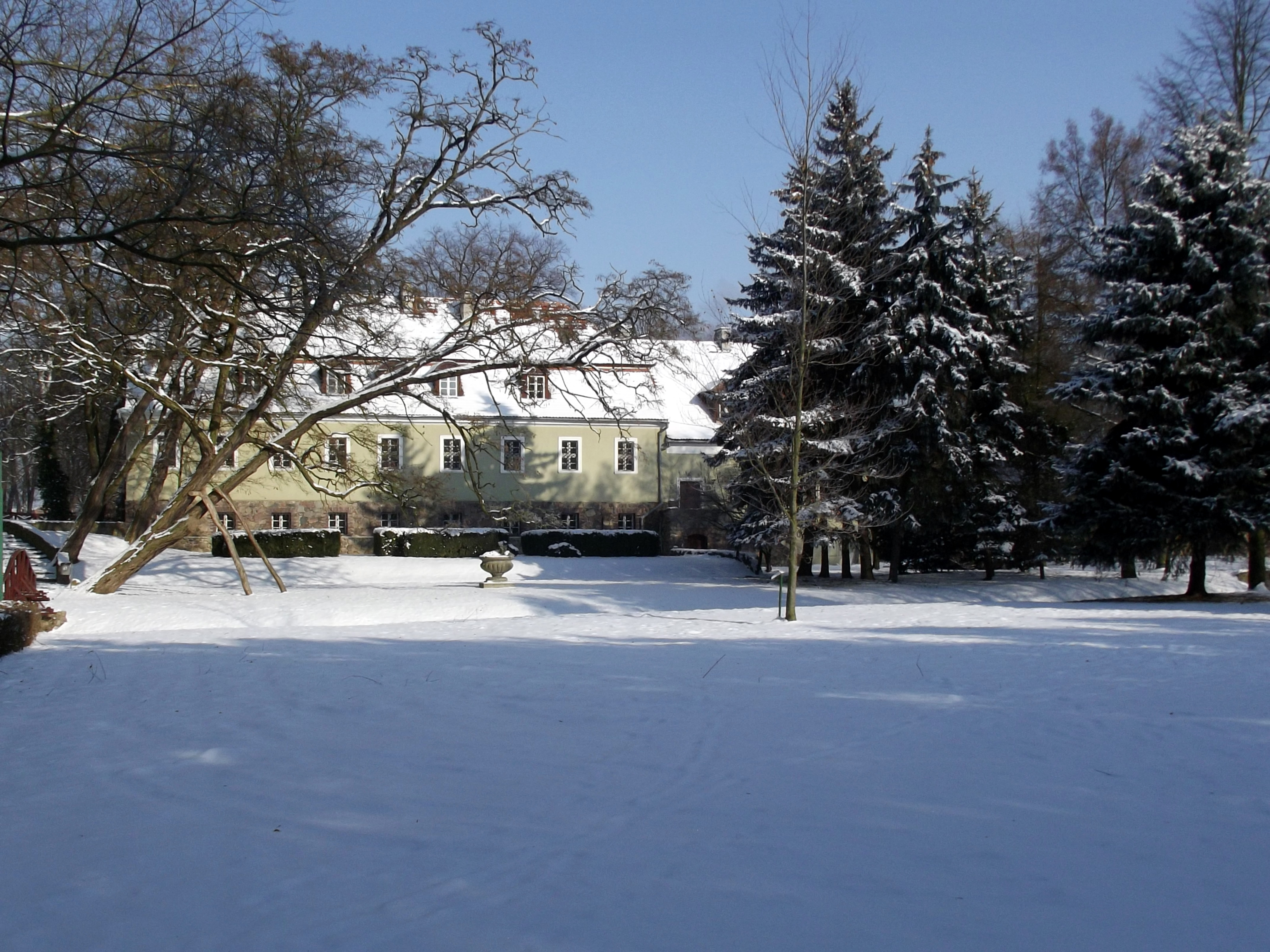 Budynek dawnego starostwa w Międzyrzeczu